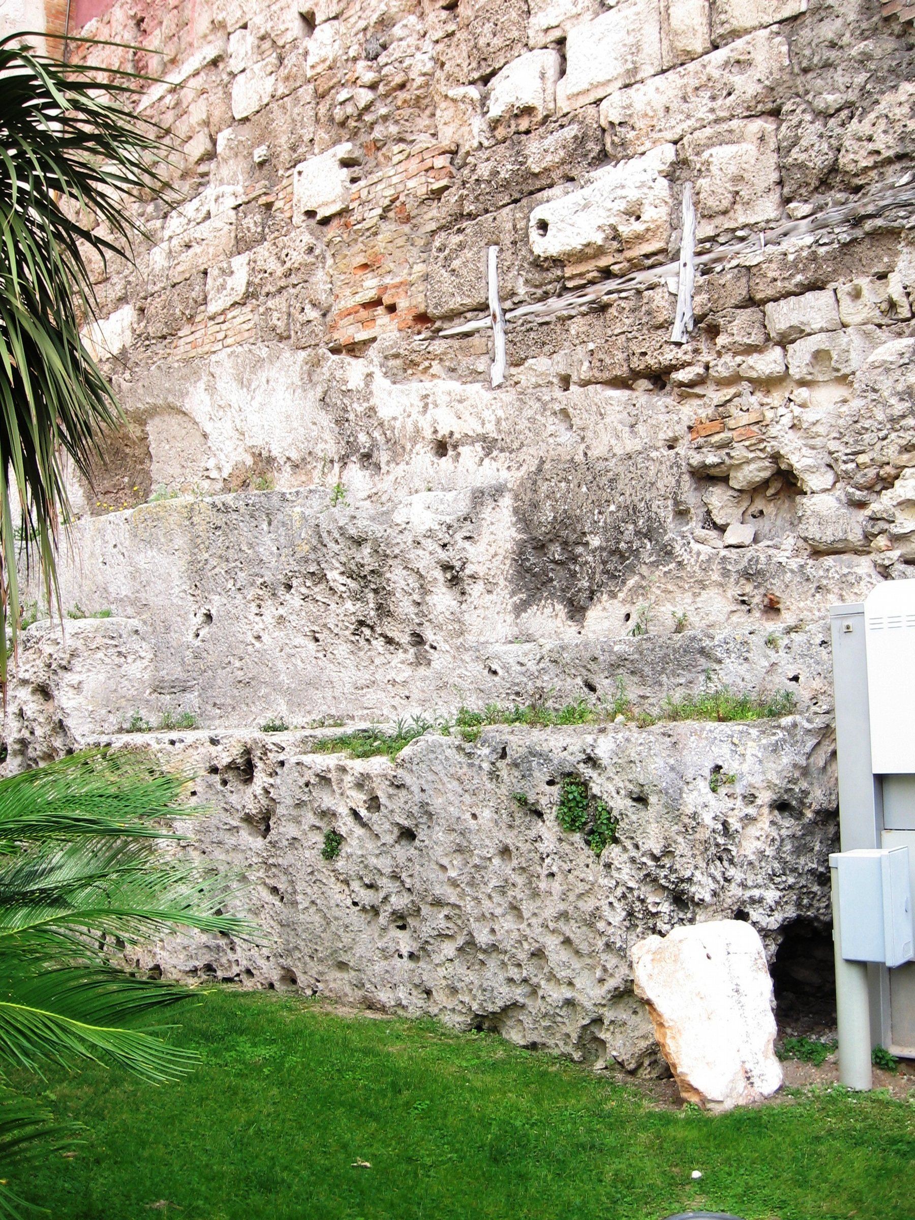 הקיר המשוחזר מככר במבצר רישיון נוצר על ידי משתמש:Daniel Ventura